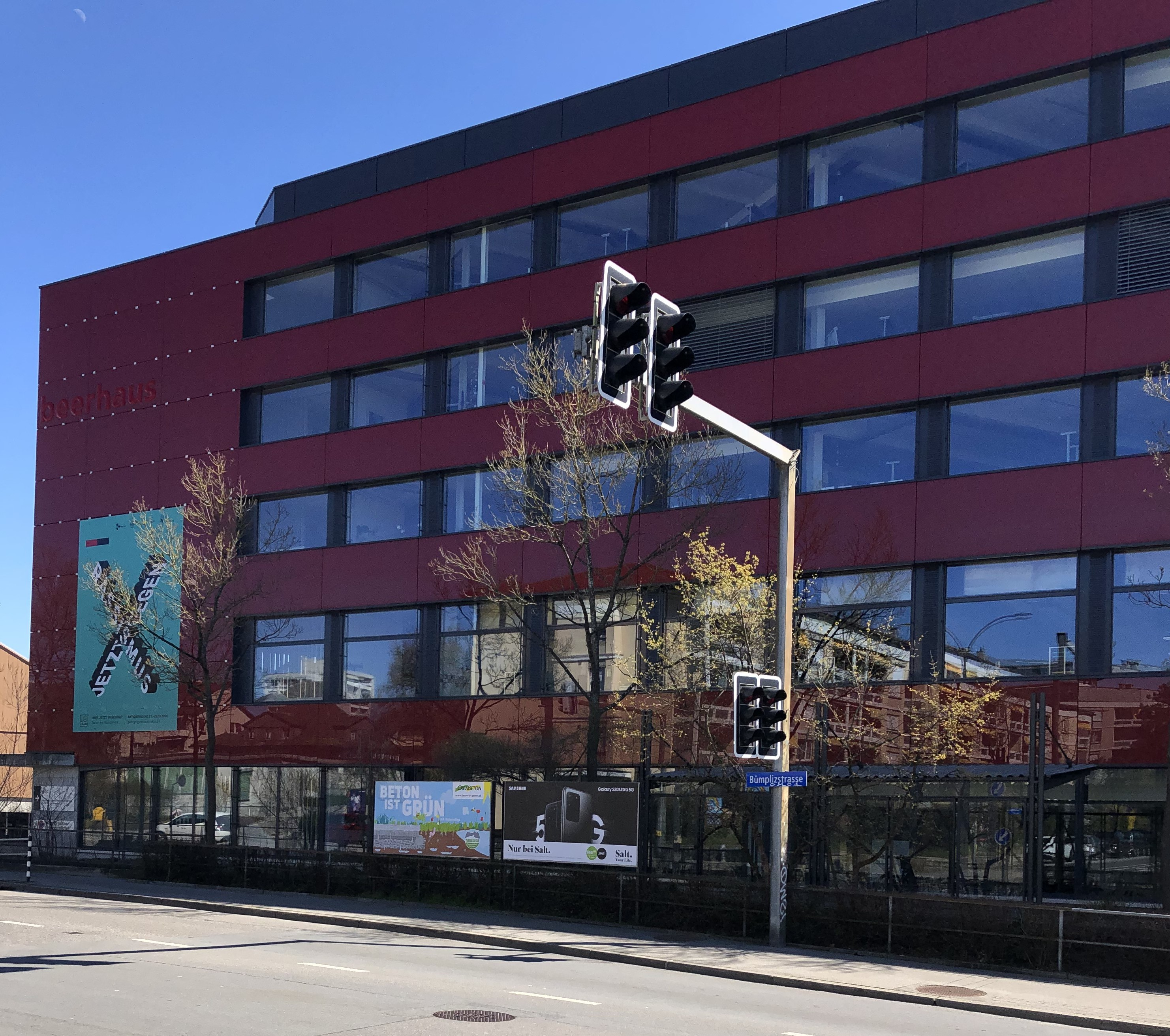 Blumenfeld beerhaus